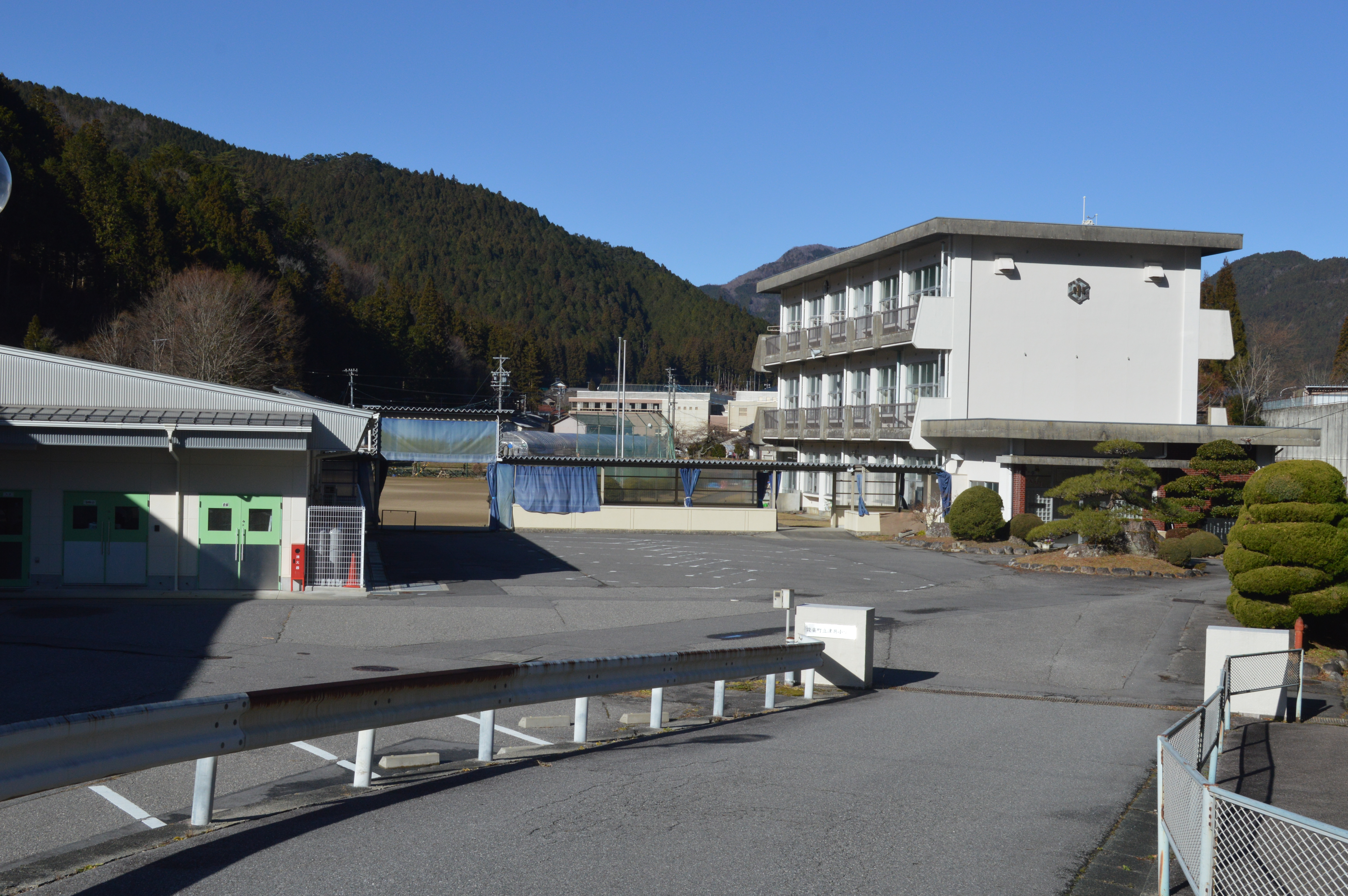 愛知県北設楽郡設楽町津具にある設楽町立津具小学校。旧・津具村立津具小学校。